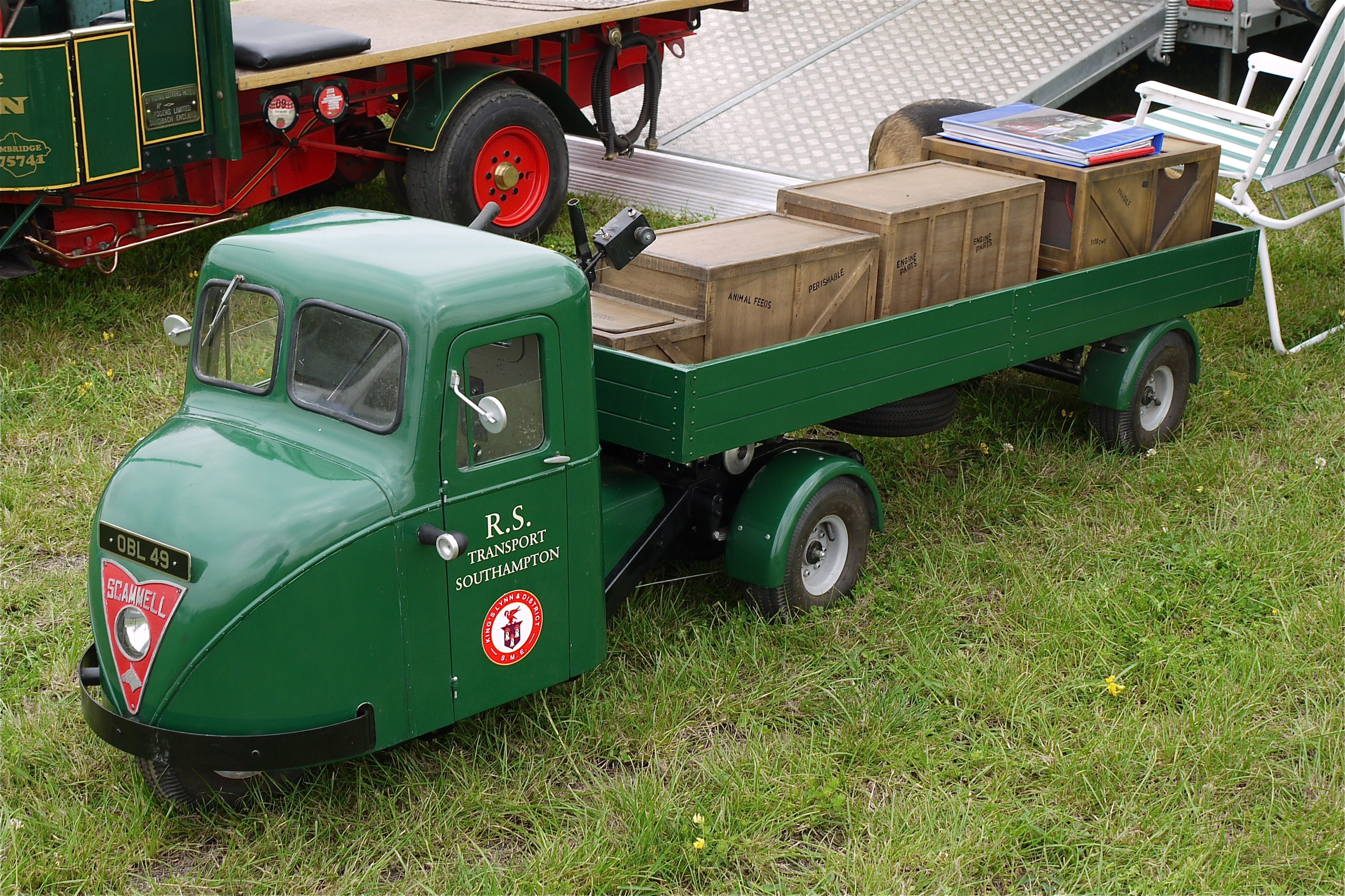 Superb scale model. Panasonic 14-45 Lens iA mode